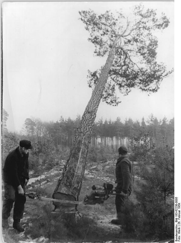 Zentralbild-Weiß Wei-Qu 2767.A.-V. 16.2.1959 Rodearbeiten für das Erdölverarbeitungswerk Schwedt-Oder haben begonnen. Anfang Februar begannen die Rodearbeiten für das große Petrolchemische Werk, das bei Schwedt-Oder errichtet wird. Die Kollegen des Staatlichen Forstwirtschaftsbetriebes Joachimsthal sind dabei, 30 Hektar hohes Holz (80 bis 130jährige Kiefern) bis zum 15.3.59 abzuholzen. UBz: Hier werden einmal die Anlagen des großen Erdölverarbeitungswerkes stehen. - Vorläufig ist man dabei, das Gelände abzuholzen. Die Kollegen Sidow und Isert (rechts) fällen mit der Motorsäge die Kiefern.